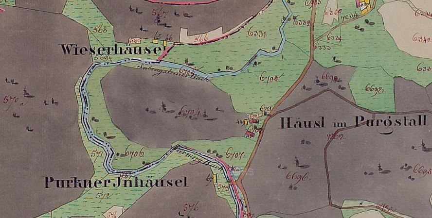 Burgstall Säbnich auf der Urmappe von Oberösterreich